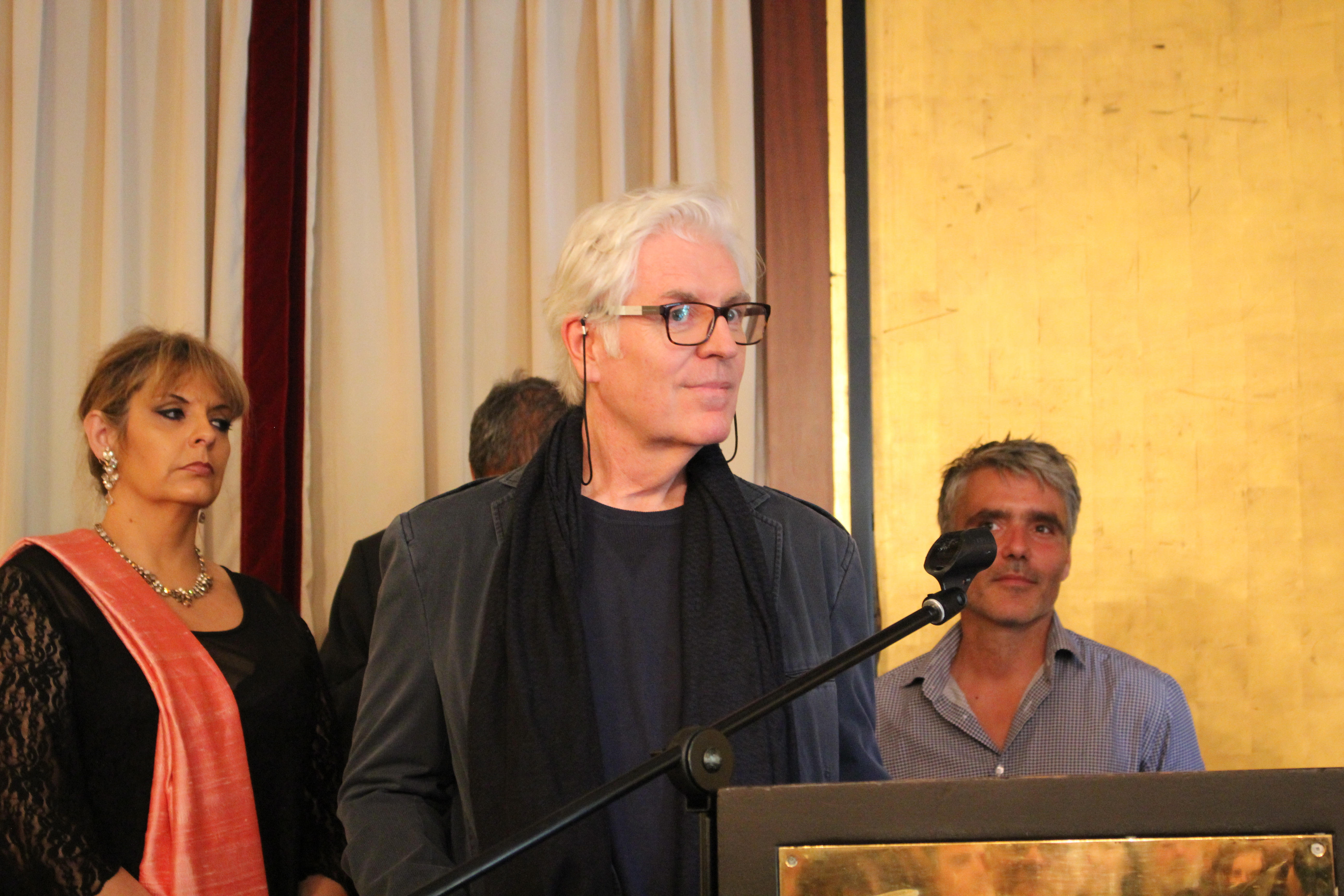 Prix Marcel Pagnol 2015 : Gilles Leroy pour Le monde selon Billy Boy